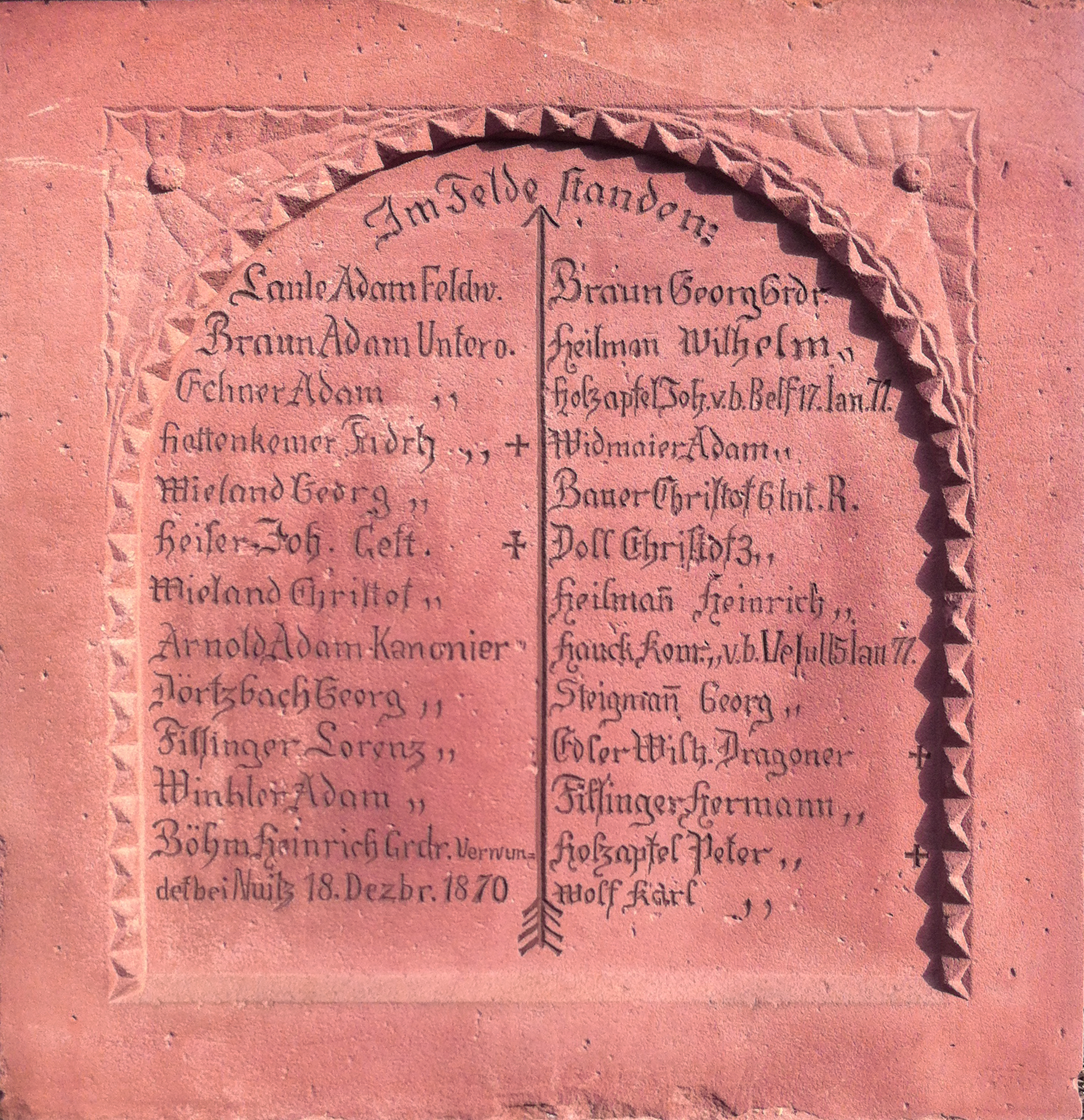 Kriegerdenkmal Eschelbronn